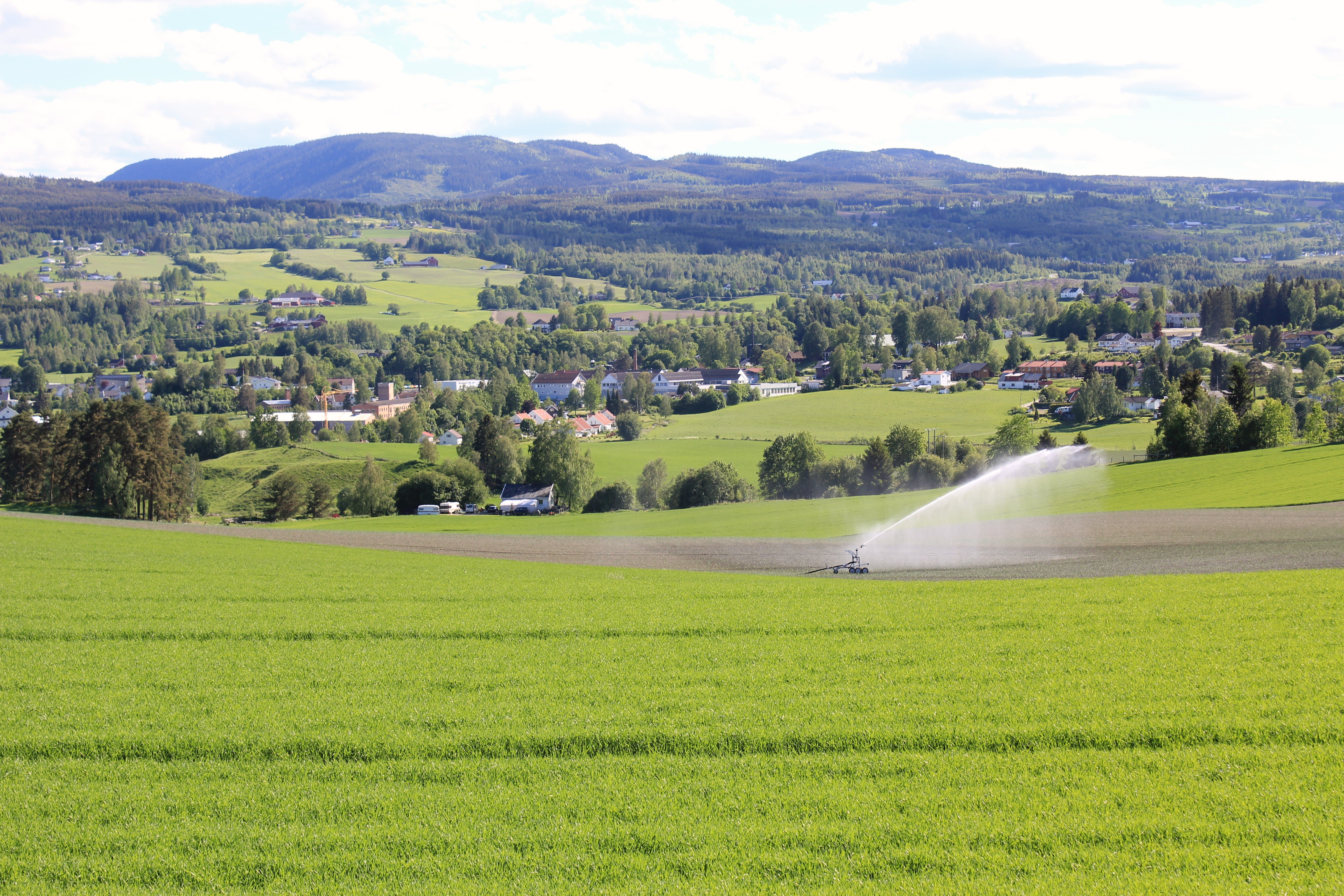 Skreia mot Totenåsen